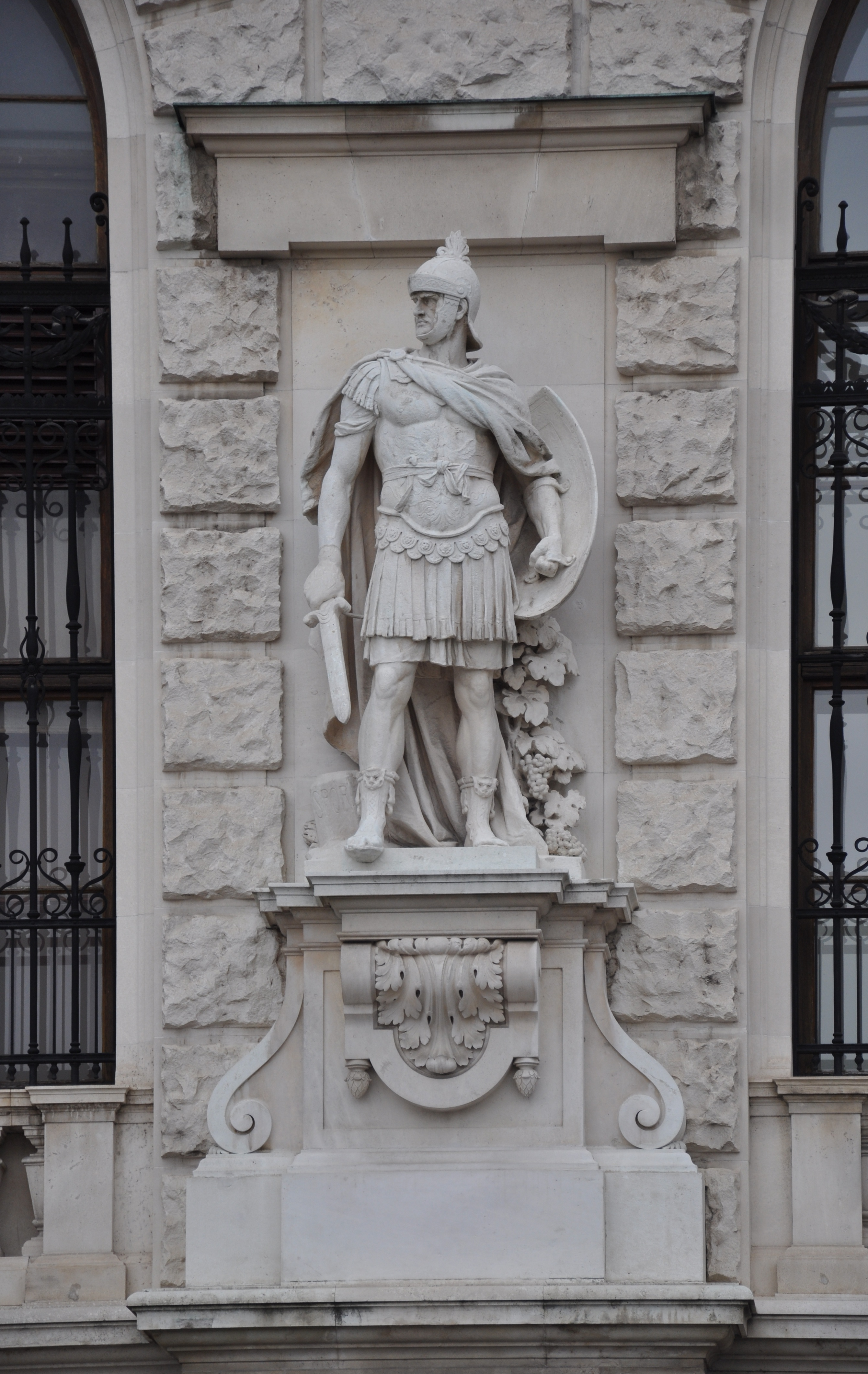 Wien, Neue Burg, Statuen an der Hauptfassade am Heldenplatz, zwanzig Gestalten der österreichischen Geschichte (verschiedene Bildhauer) Nr. 2: Wilhelm Seib: Römischer Soldat